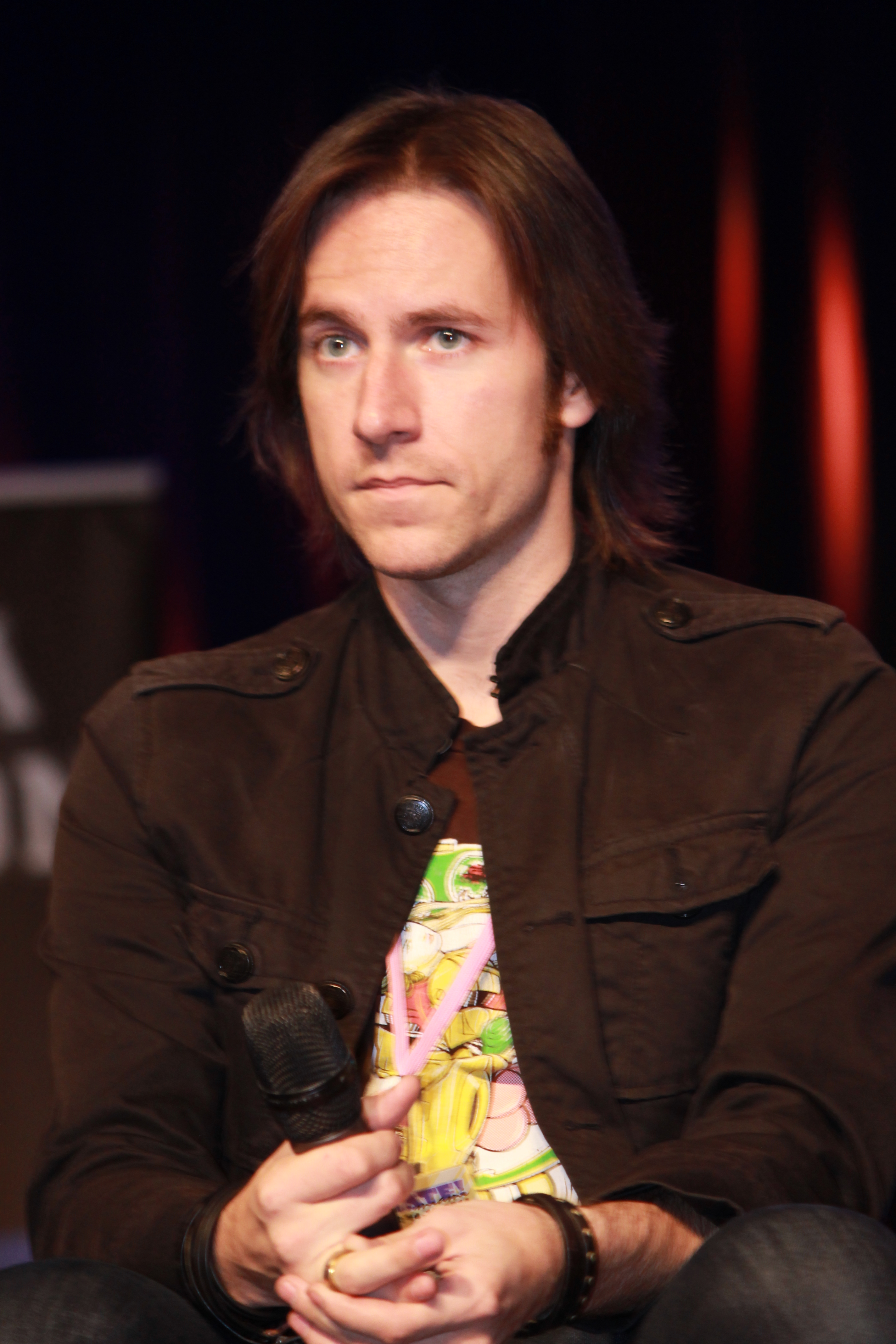 AM 11 15 sat c3_0175